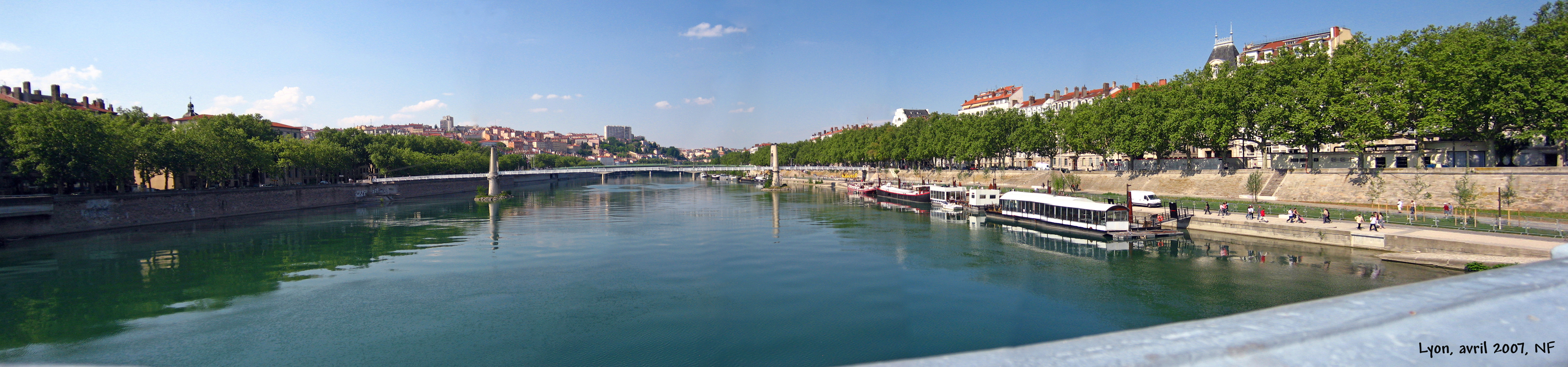 vue de Lyon depuis le pont Lafayette sur le Rhône